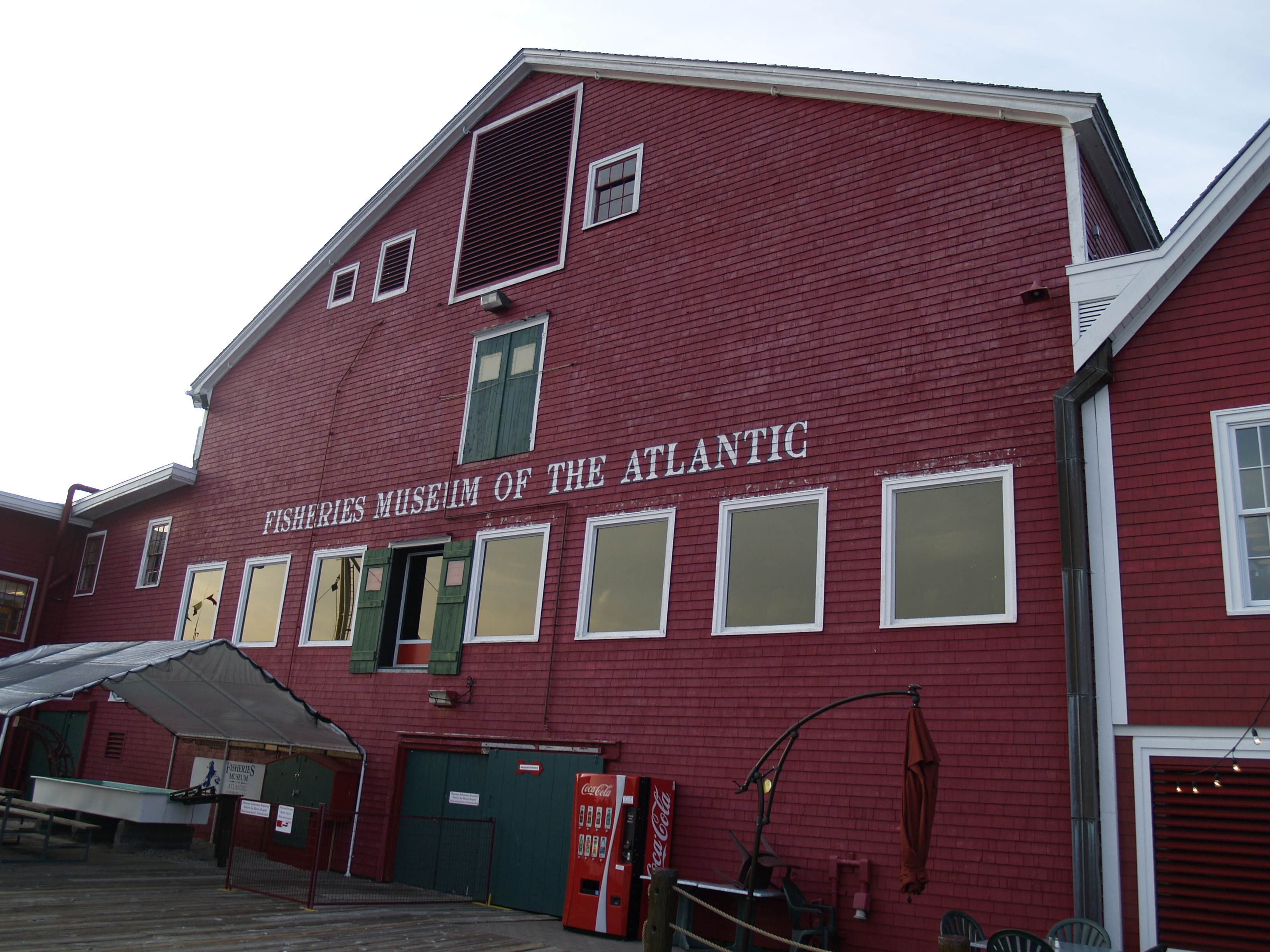 Fisheries Museum of the Atlantic